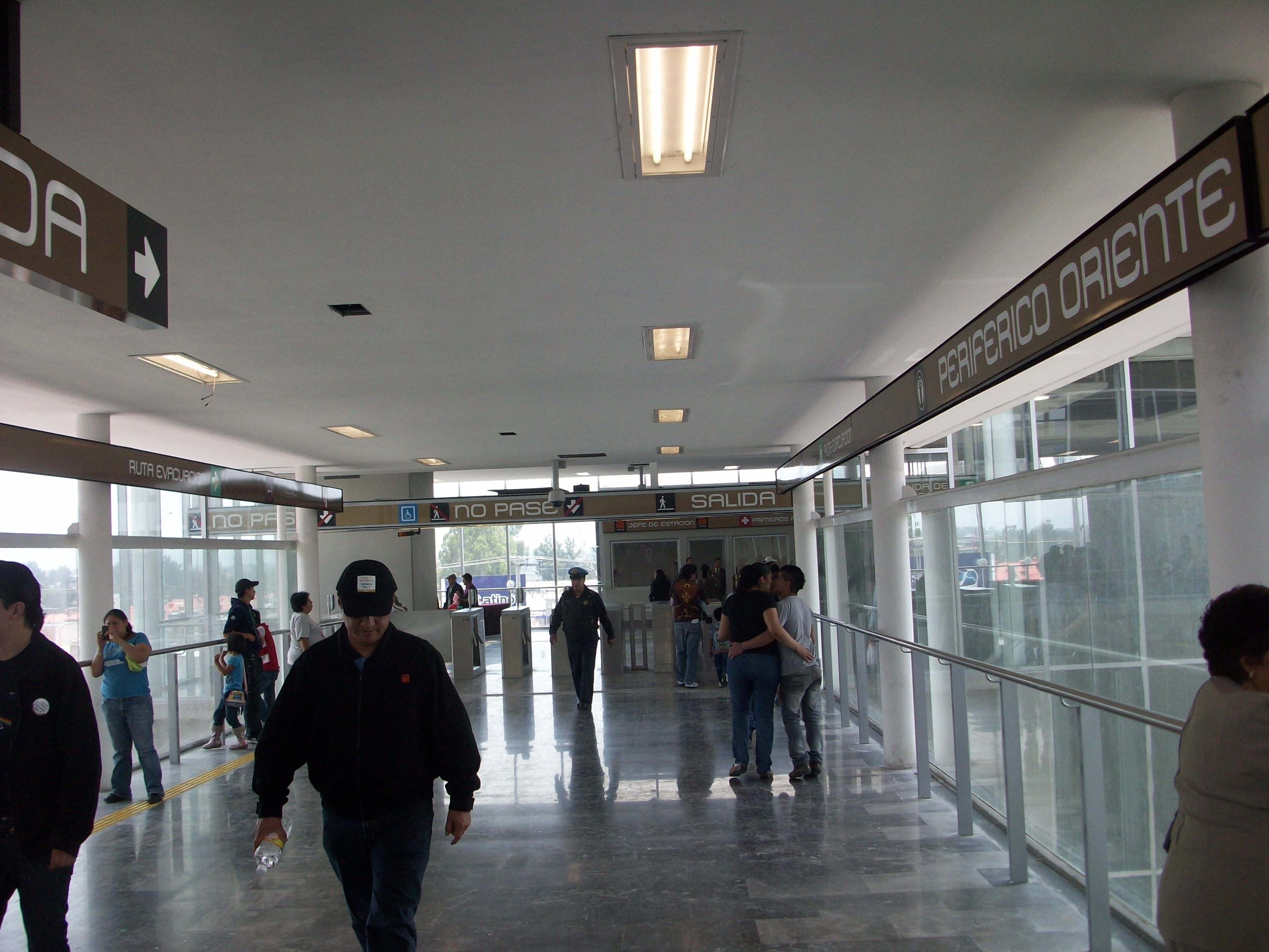 puente de acceso al vestibulo del primer piso